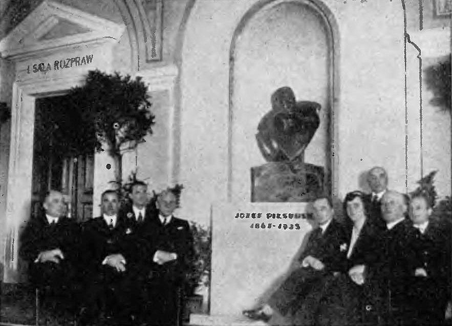 Odsłonięcie popiersia Marszałka Piłsudskiego w gmachu Sądu Okręgowego we Lwowie w maju 1936. W grupie po lewej od lewej prokurator dr Józef Chirowski, wiceprezes SA Ojak, wiceprokurator SO dr Juliusz Prachtel-Morawiański, prezes SA Marian Zbrowski. W grupie po prawej prokurator SA Stanisław Dębicki, sędzia Helena Lepiarzowa, wiceprezes Sądu Okręgowego Karnego Lucjan Malicki, asesor Sądu Pracy Kozłowski i w głębi kierownik sekretariatu SA Olejowski.